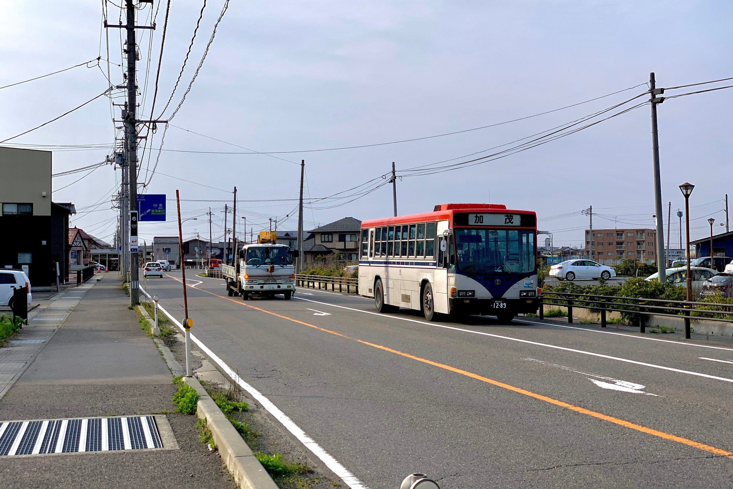 新潟県道9号長岡栃尾巻線 巻潟東インターチェンジ駐車場付近（新潟市西蒲区，2020年4月）